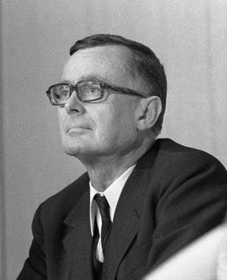 Pressekonferenz der SPD im Fraktionssaal der SPD (Bundeshaus) [Prof. Dr. Karl Schiller]